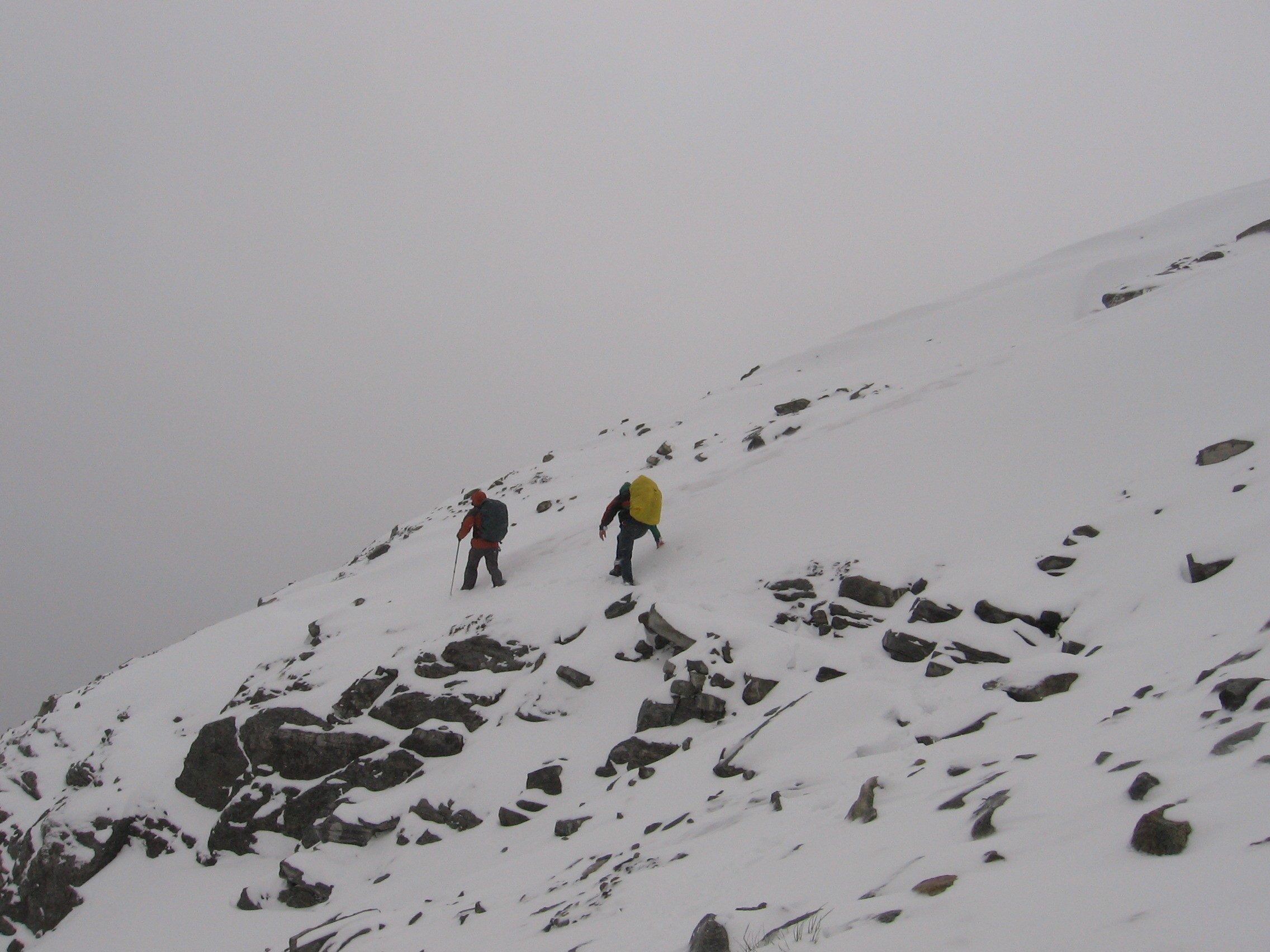 Wettersturz auf dem Berliner Höhenweg, Juli 2008